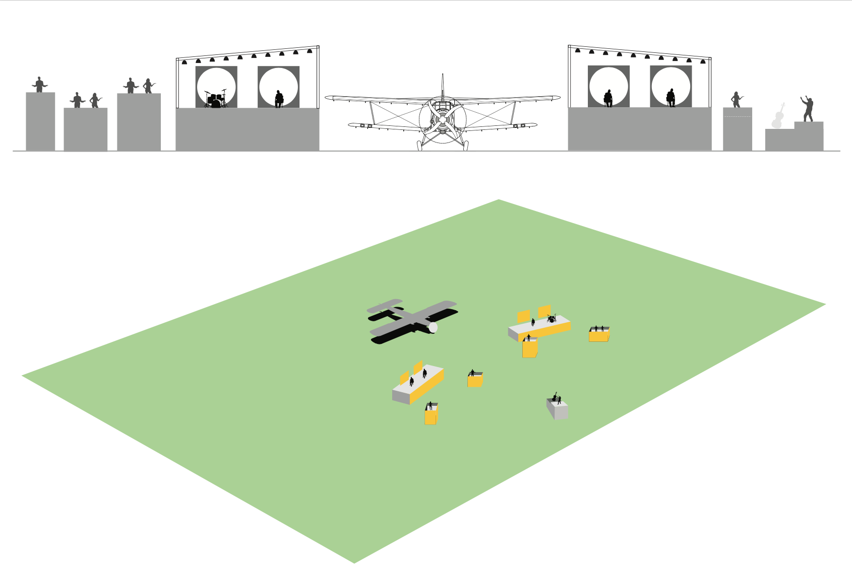 File:Aerophonia 4.jpg